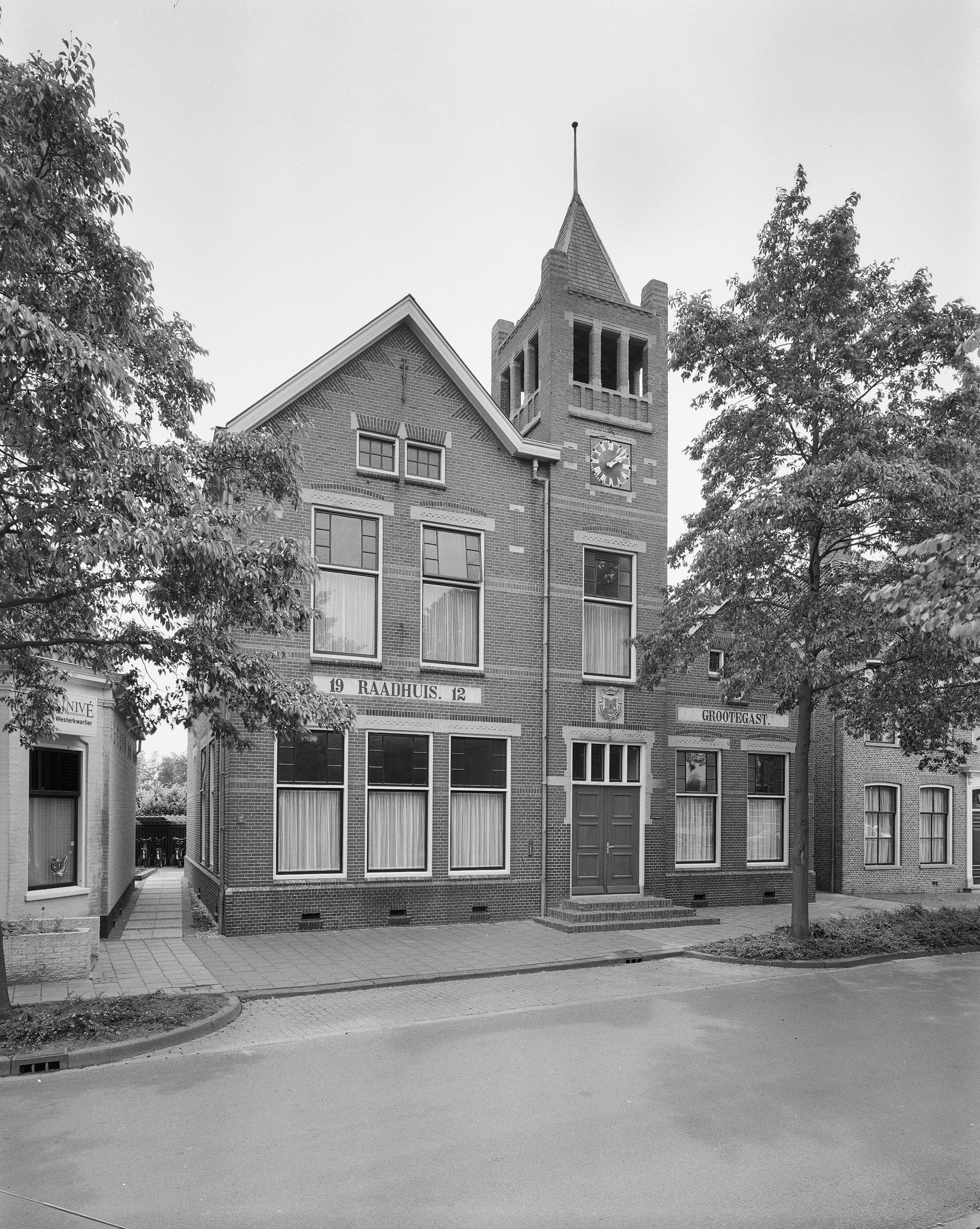 Raadhuis: Overzicht voorgevel met toren en linker zijgevel (opmerking: Gefotografeerd voor Monumenten In Nederland Groningen)